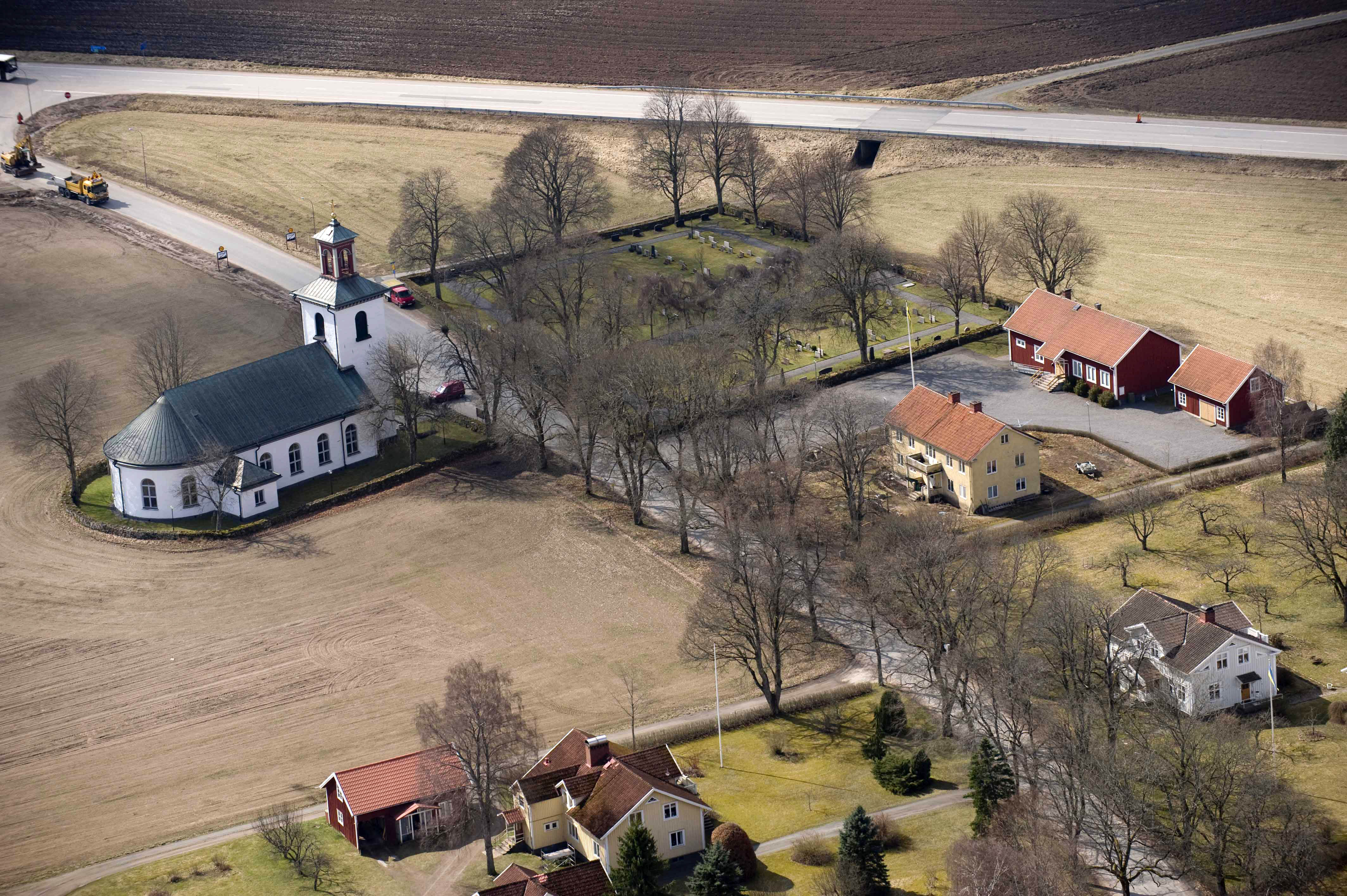 Tånnö ka